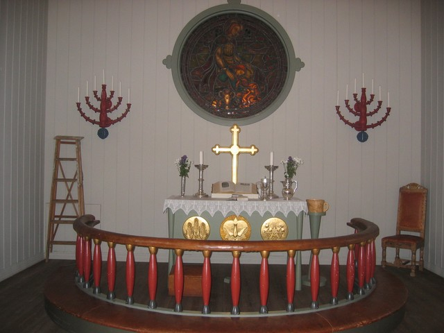 Alterpartiet i Ballangen i Ballangen